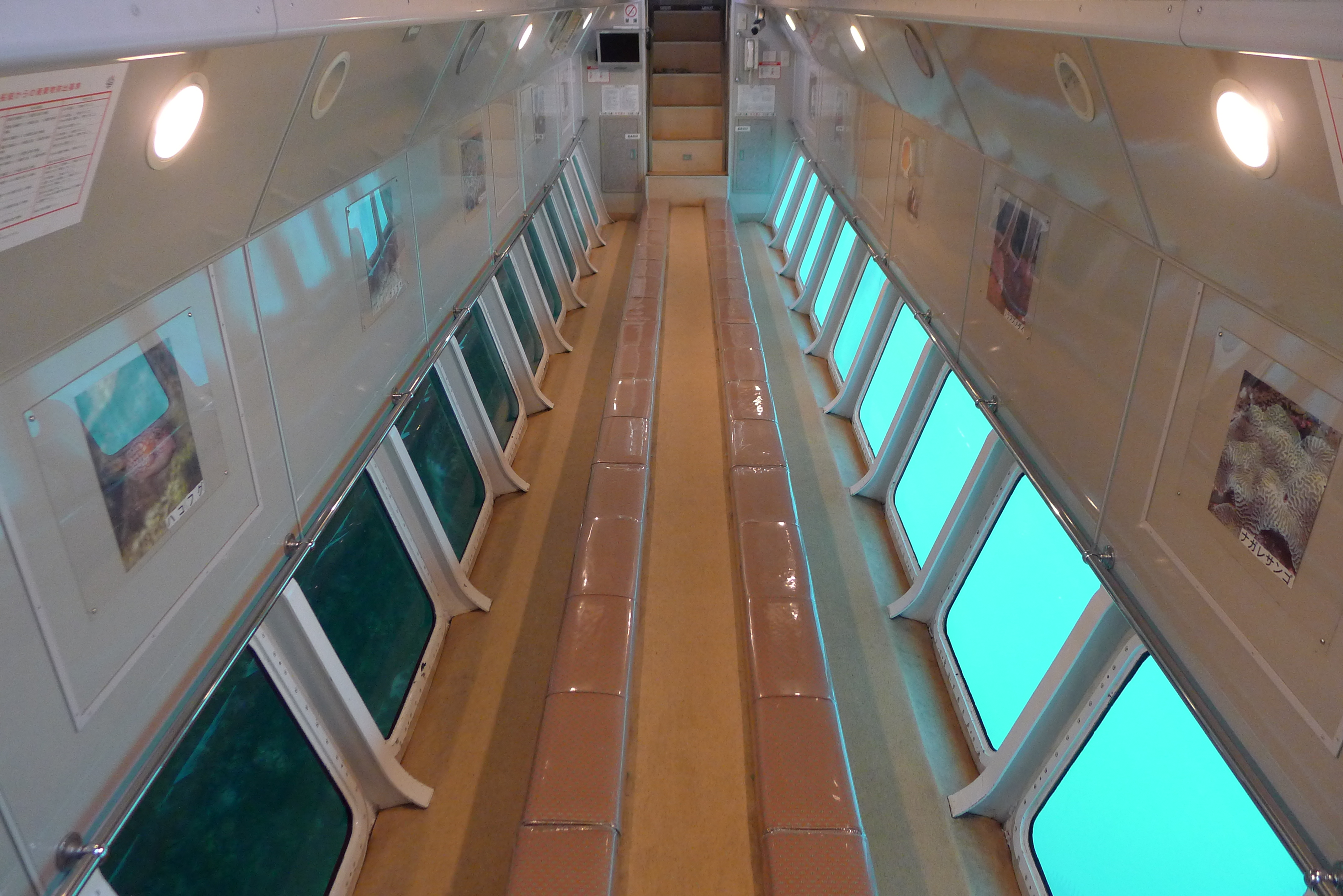 福江島福江港～久賀島を結ぶ高速艇シーガルの船底部、海中観察ができる